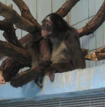 Goldstirn-Klammeraffe - Ateles belzebuth hybridus (Zoo Frankfurt)